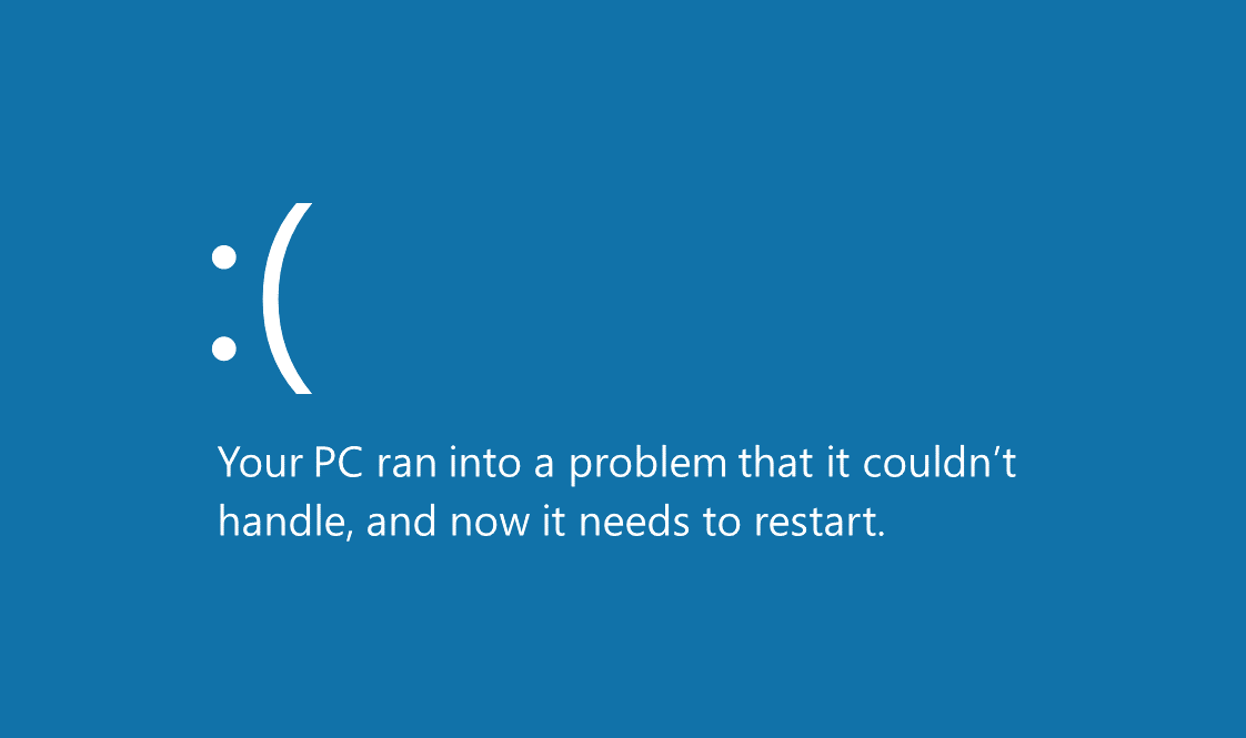 Een blauw scherm des doods. Zo accuraat mogelijk nagemaakt.